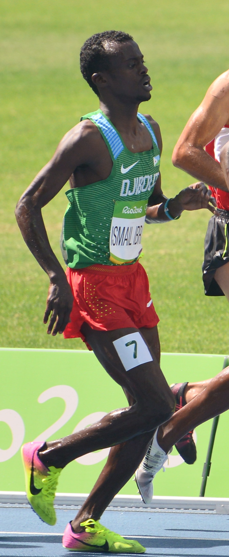 Série du 3000m steeple Homme des JO de Rio, 2016